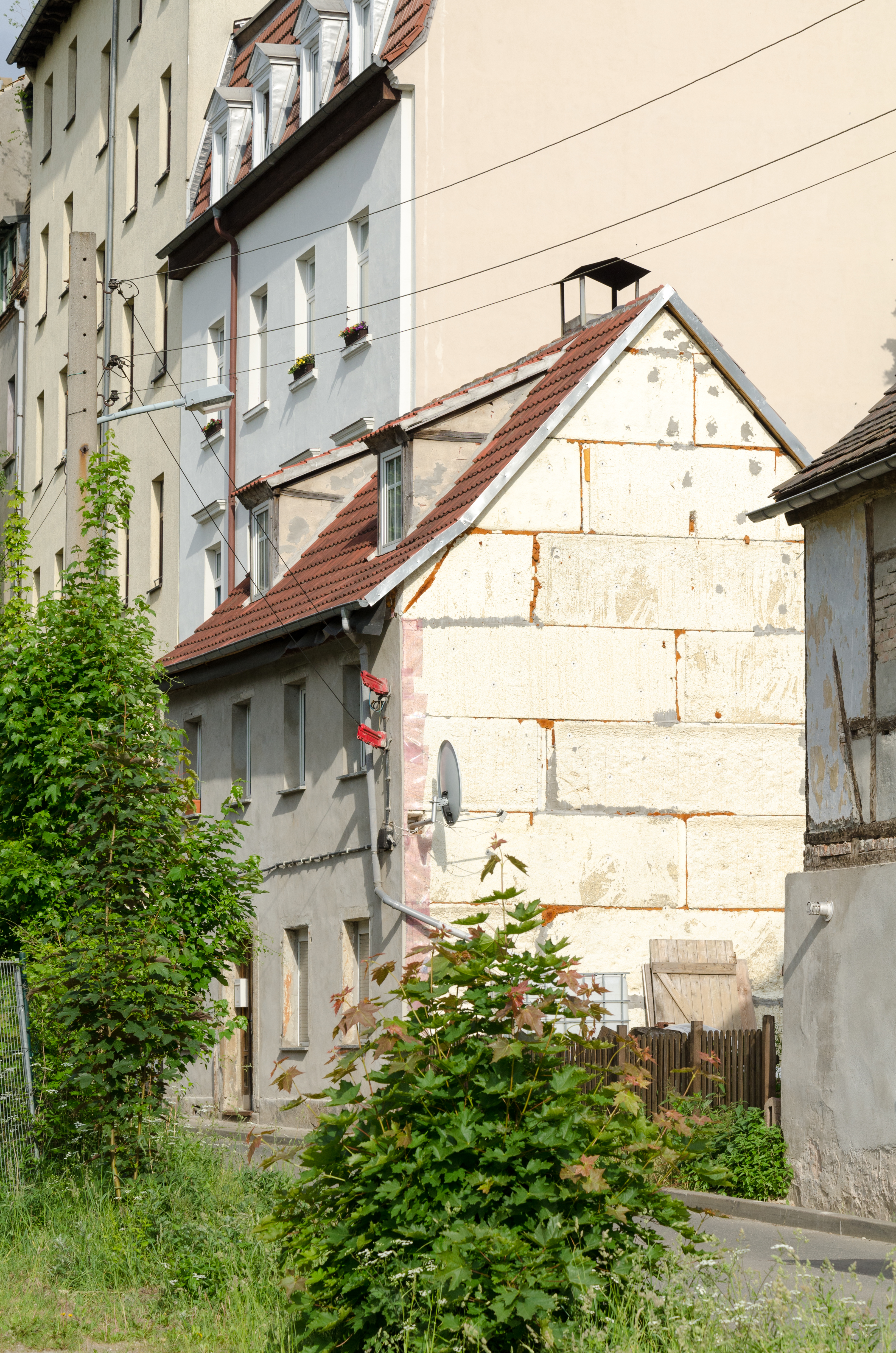 Zeitz, Rothestraße 27